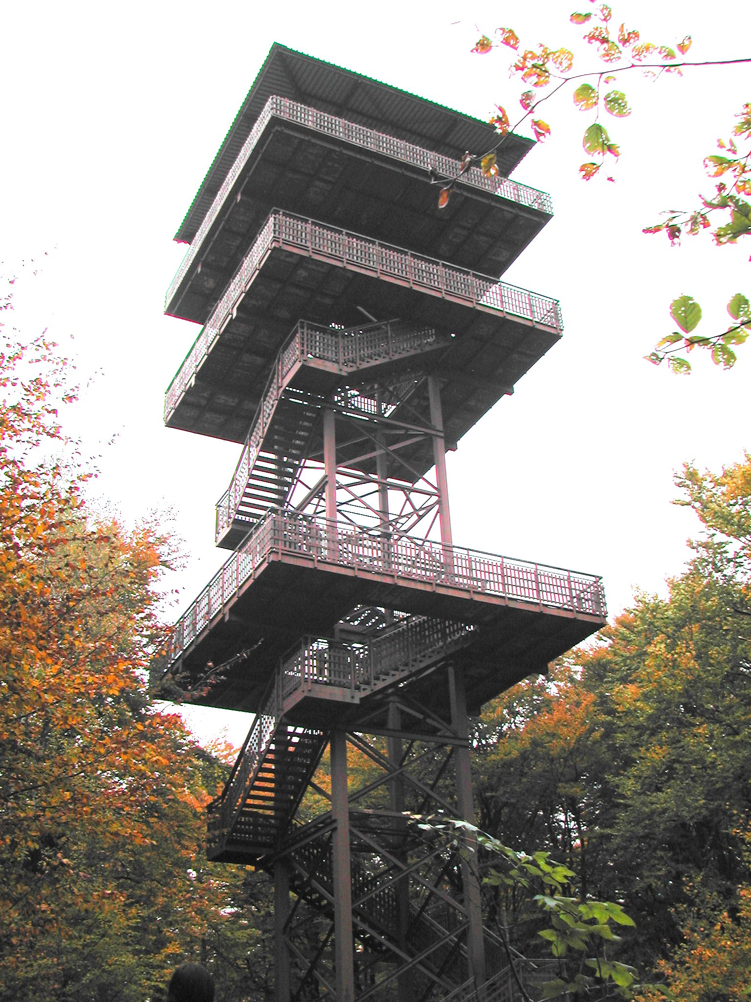 Wieżyca - platforma widokowa Zdjęcie wykonane 22.10.2005 na Wieżycy (woj. pomorskie).